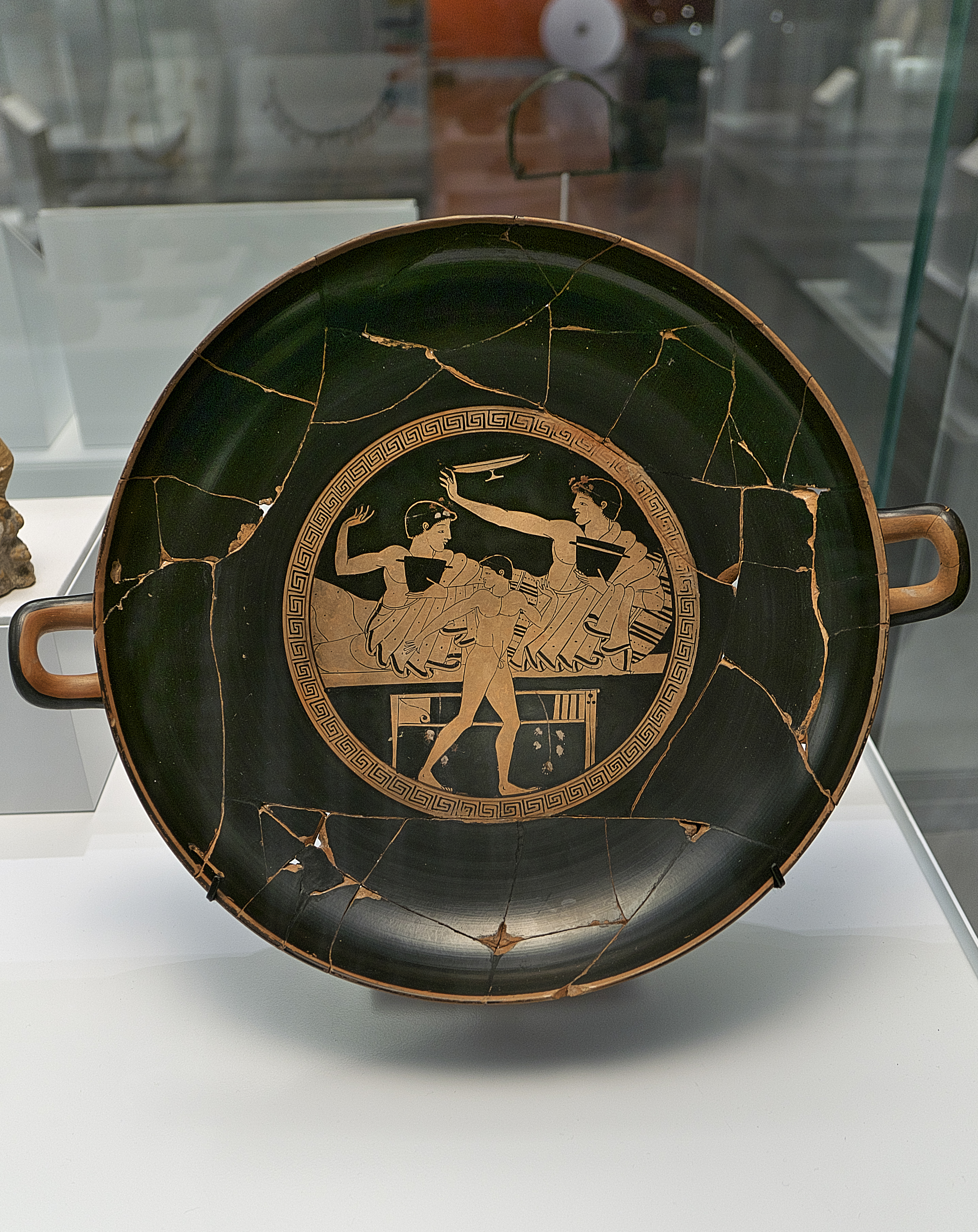 Unos jóvenes juegan al cótabo en un banquete. Kilix de cerámica de figuras rojas, procedente de Atenas (ca. 490-480 a.C.)